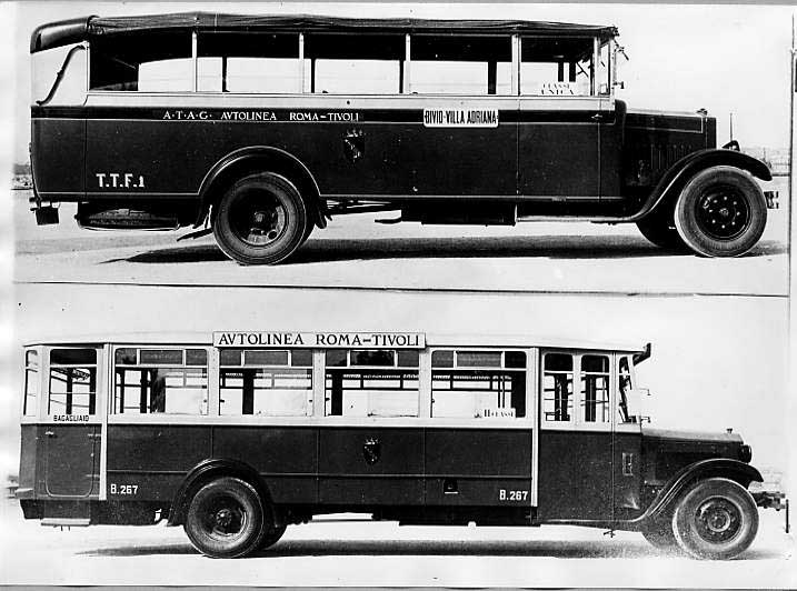 Autobus urbani adattati per l'autolinea Roma-Tivoli